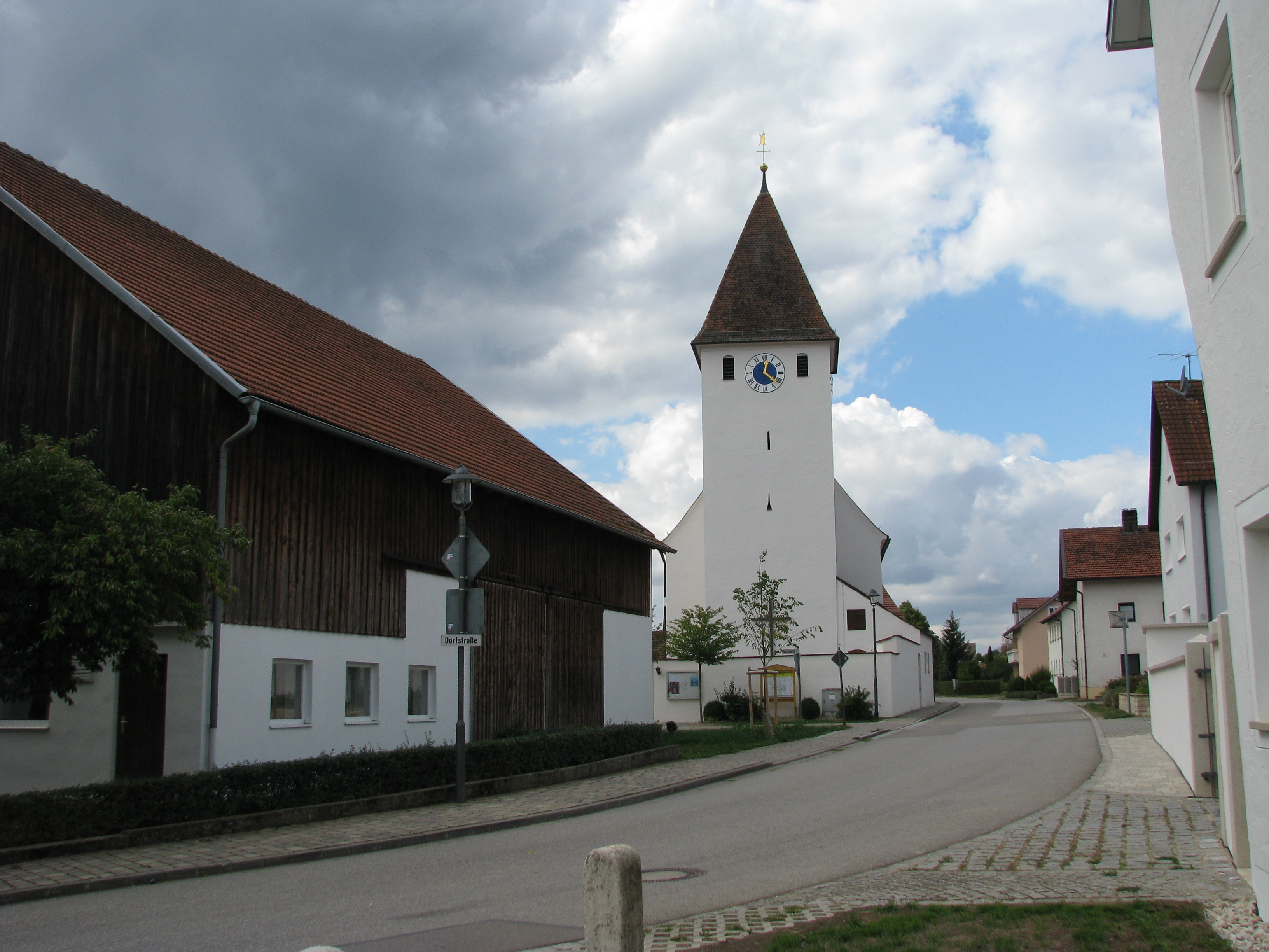 Kaldorf (Gemeinde Titting im Landkreis Eichstätt)